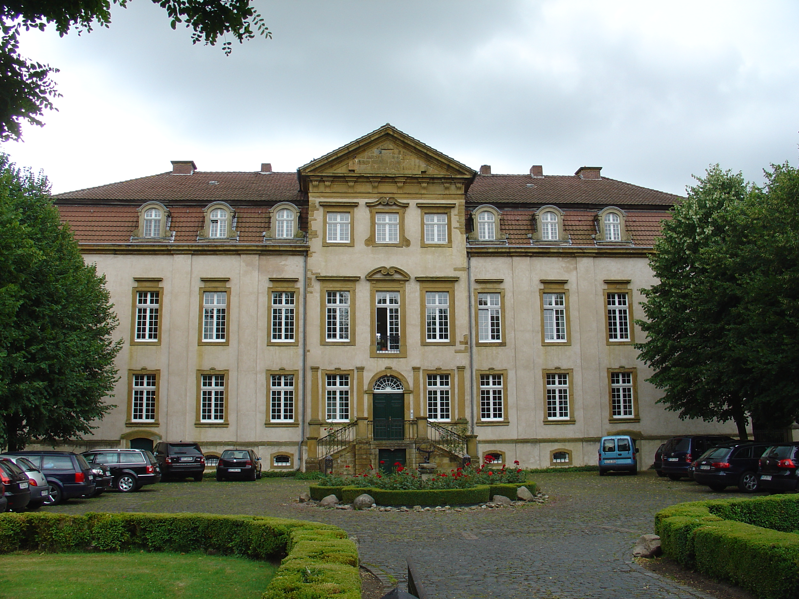 Herrenhaus des Schloss Möhler